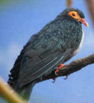 Papuan Mountain Pigeon - self made